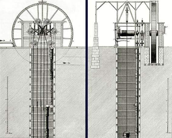 La machine du Chapelet, établie par Pierre-Joseph Laurent à la mine de Pont-Péan, dessinée et présentée dans l'encyclopédie de Diderot par Louis-Jacques Goussier